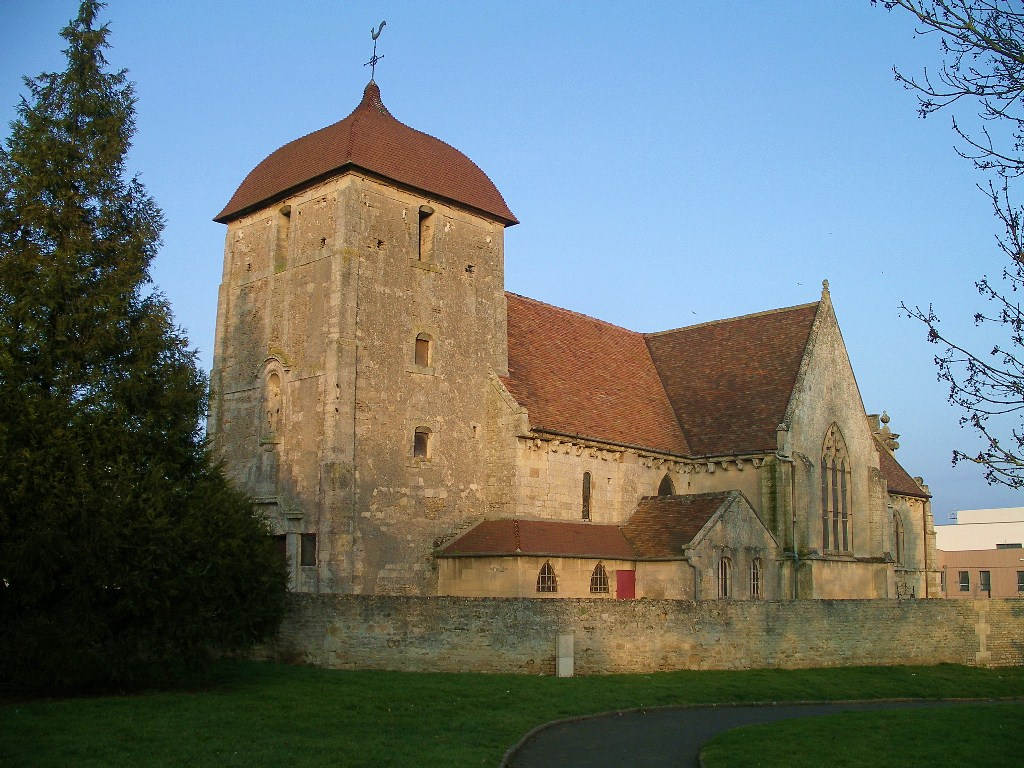 Église Saint-Gerbold de Blainville-sur-Orne (Calvados) (France)